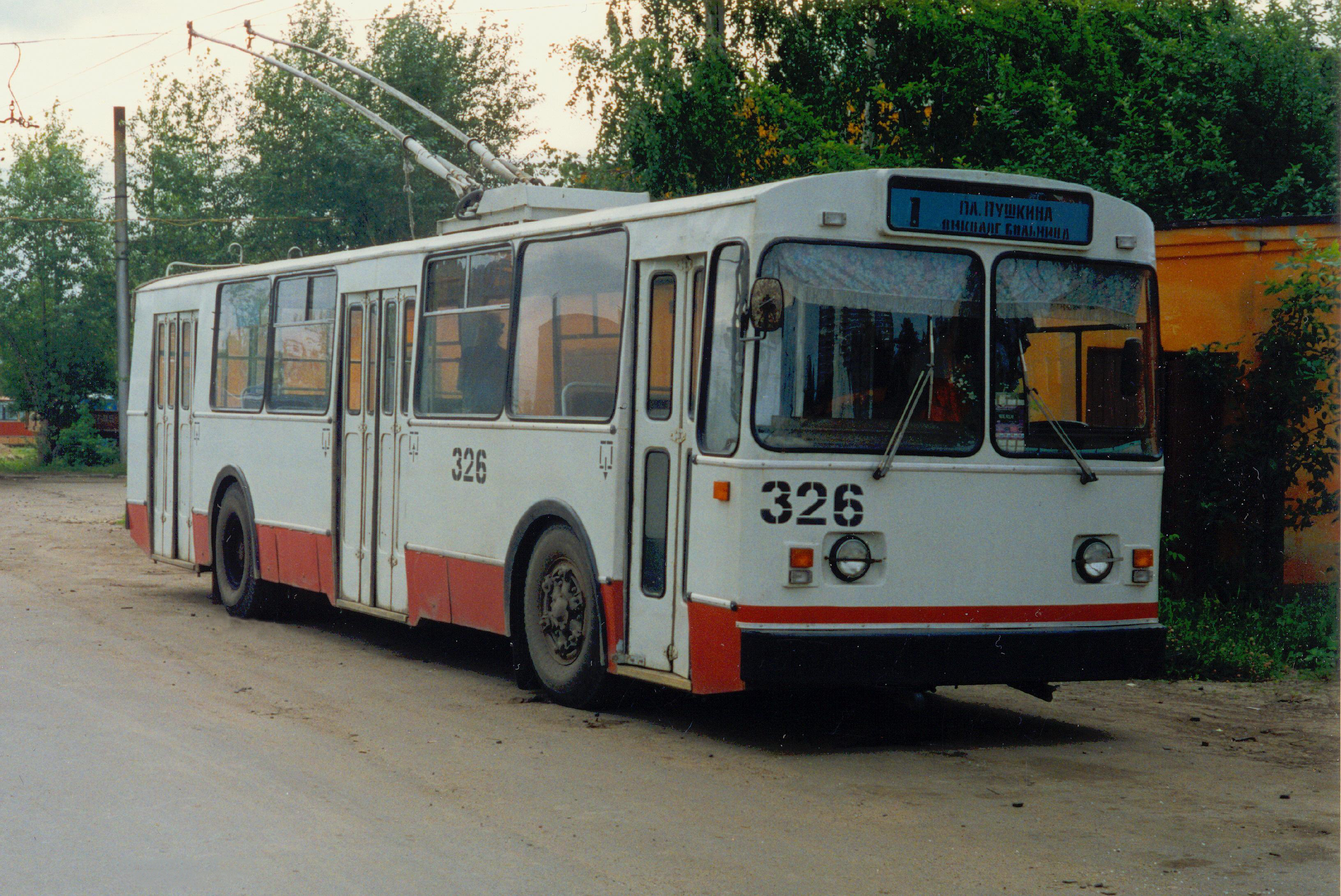 ЗиУ-682В № 326 КР ВМЗ